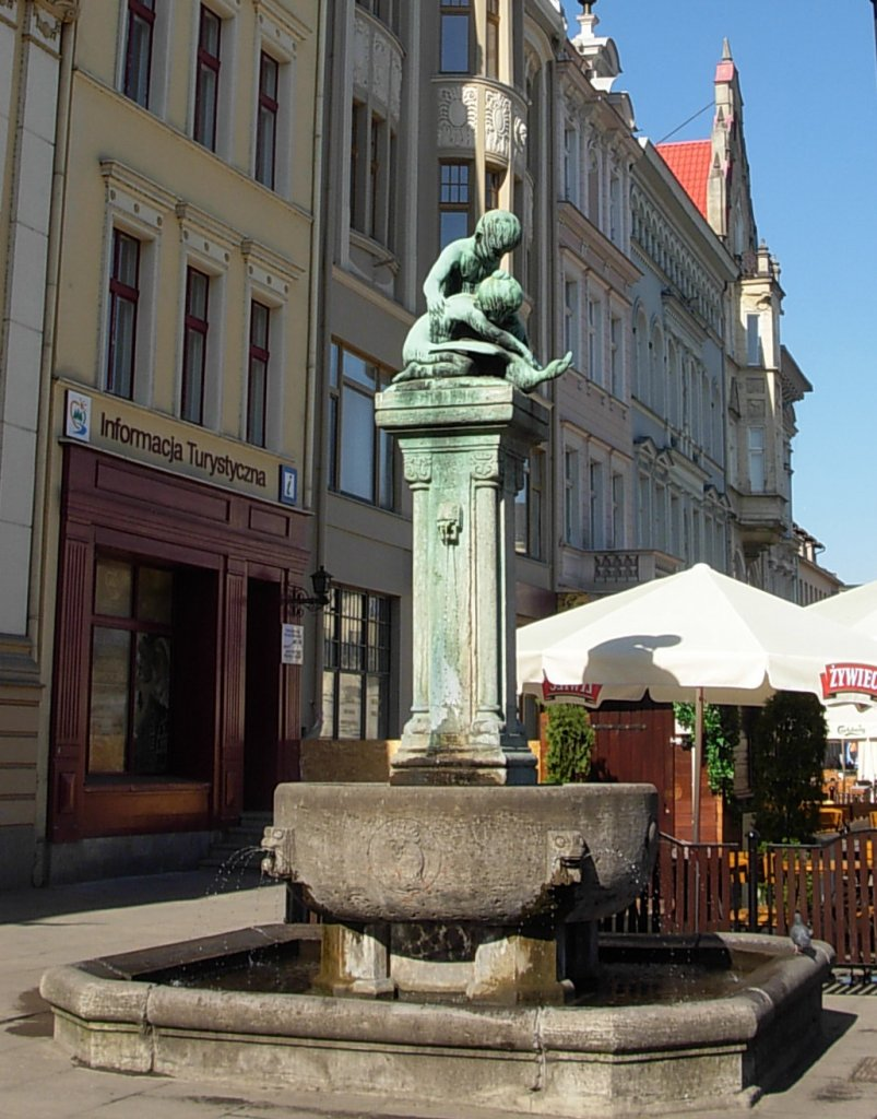 Dzieci bawiące się z gęsią - fontanna z rzeźbą na Starym Rynku w Bydgoszczy